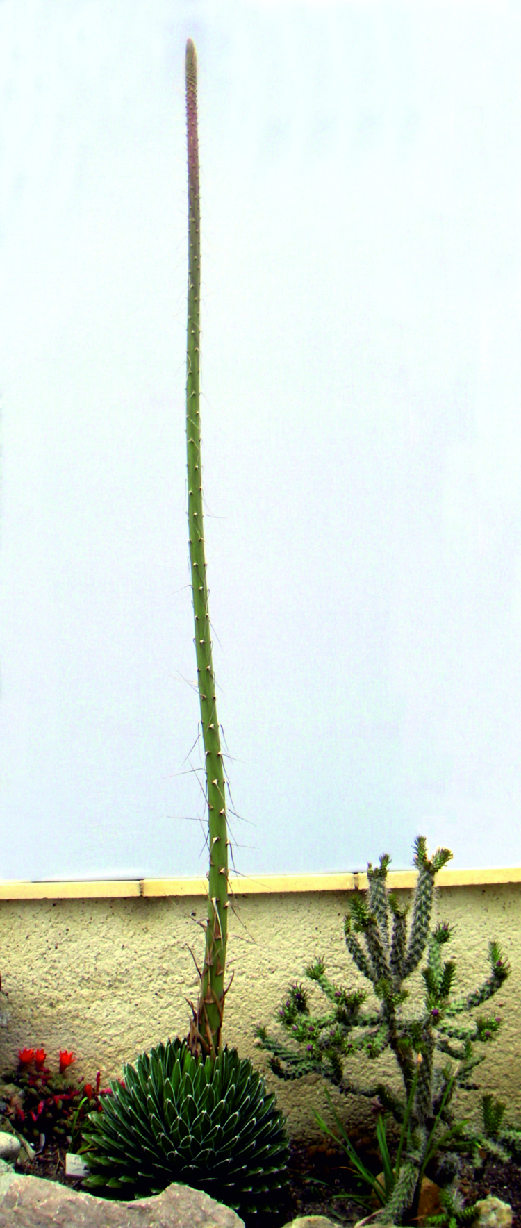 Hampe florale (juste avant la floraison) de victoriae-reginae (mai 2012). La hampe mesure 2,04 mètre de hauteur.